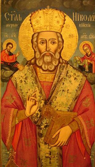 Икона на Св. Никола од 1842 година. Дело на зограф Хаџи Костадин, црква „Св. Параскева“ - с. Мургаш. Денес се чува во галеријата на икони, Црква “Св. Никола“, Куманово